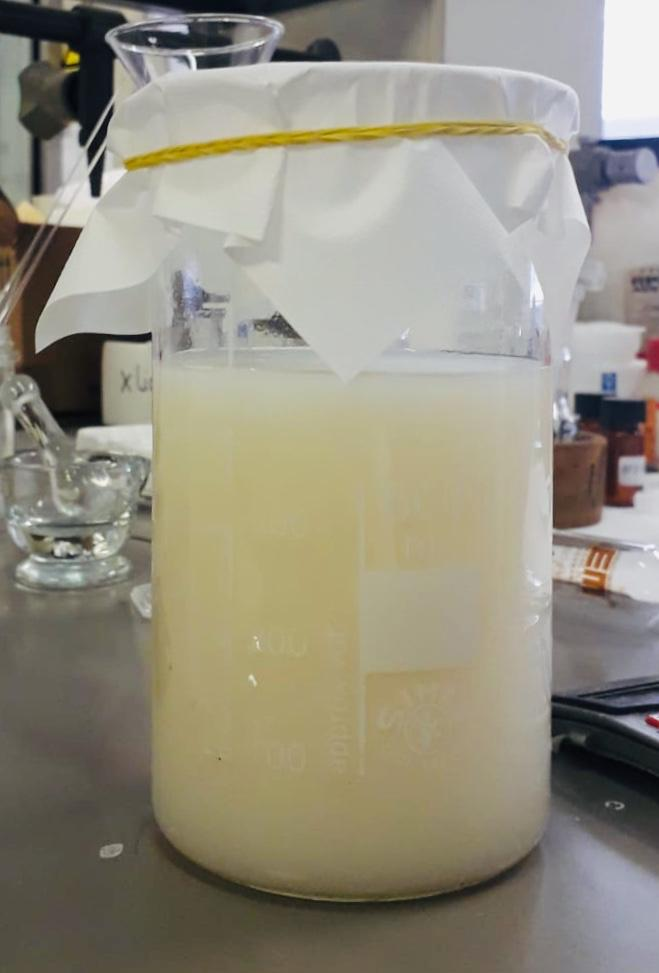 Sospensione di nanocellulosa ultrasonicata in acqua.